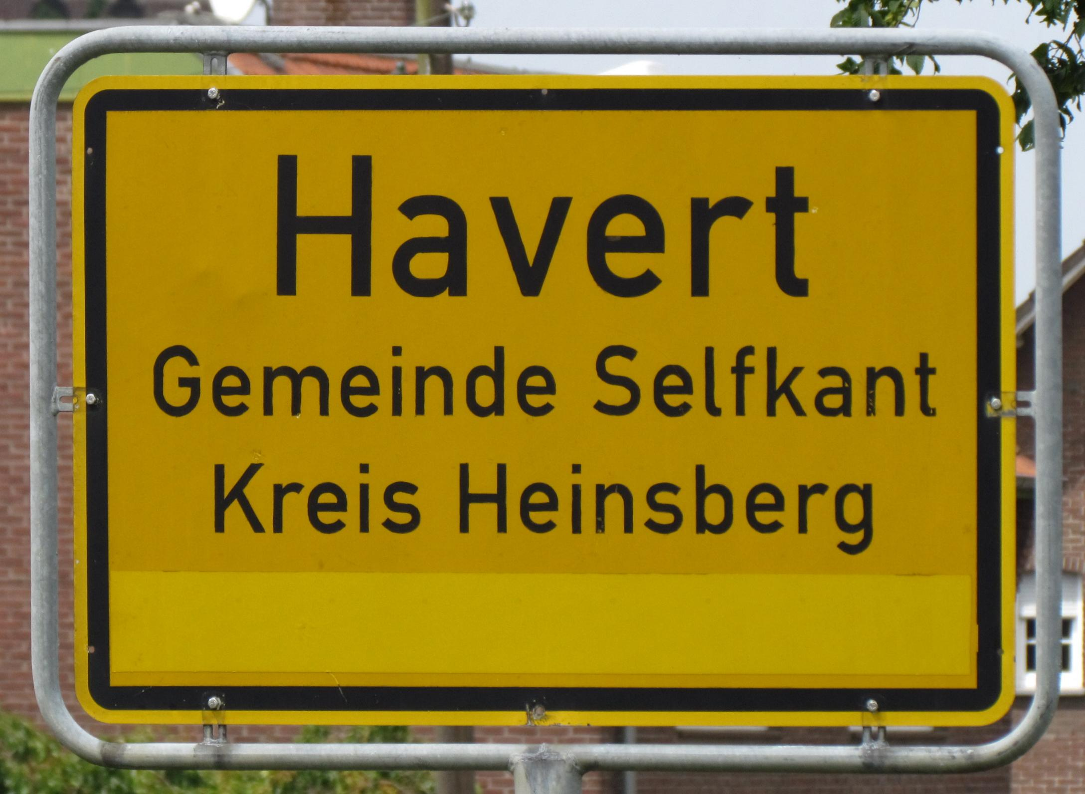 Ortstafel Havert. Zeichen aus der Zeit zwischen 1982 und 1992.